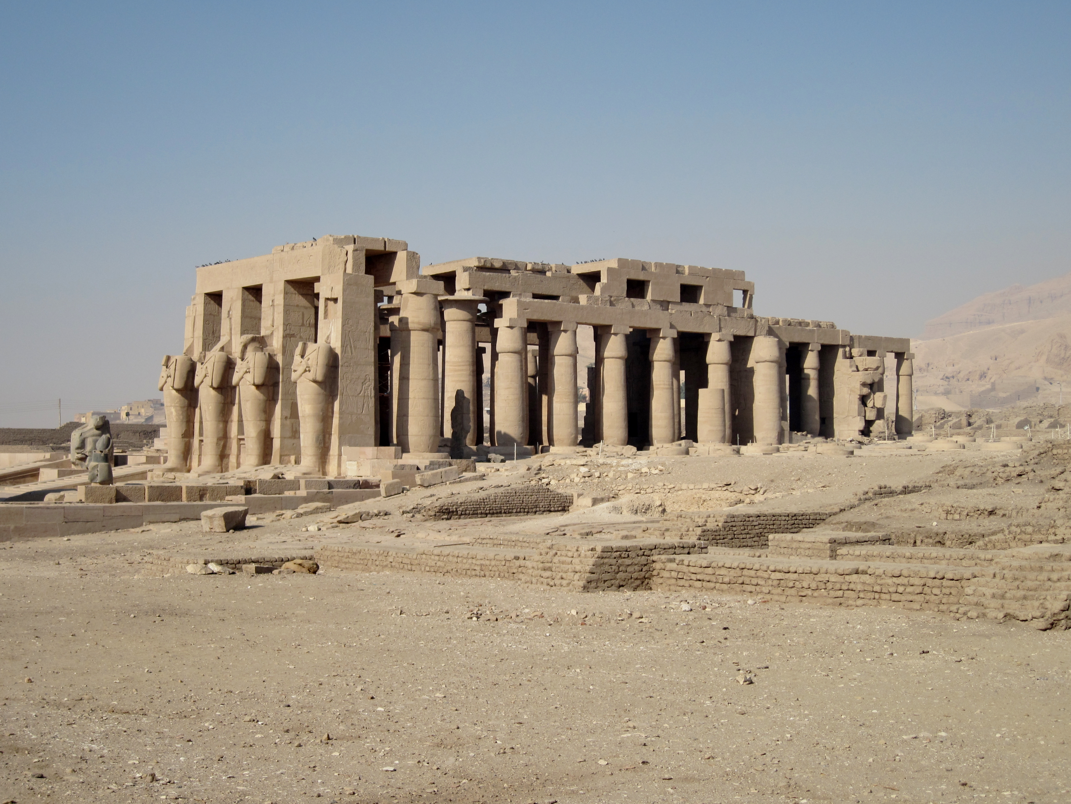 Totentempel des Ramses II. in Theben-West nordwestlich von Luxor, Ägypten